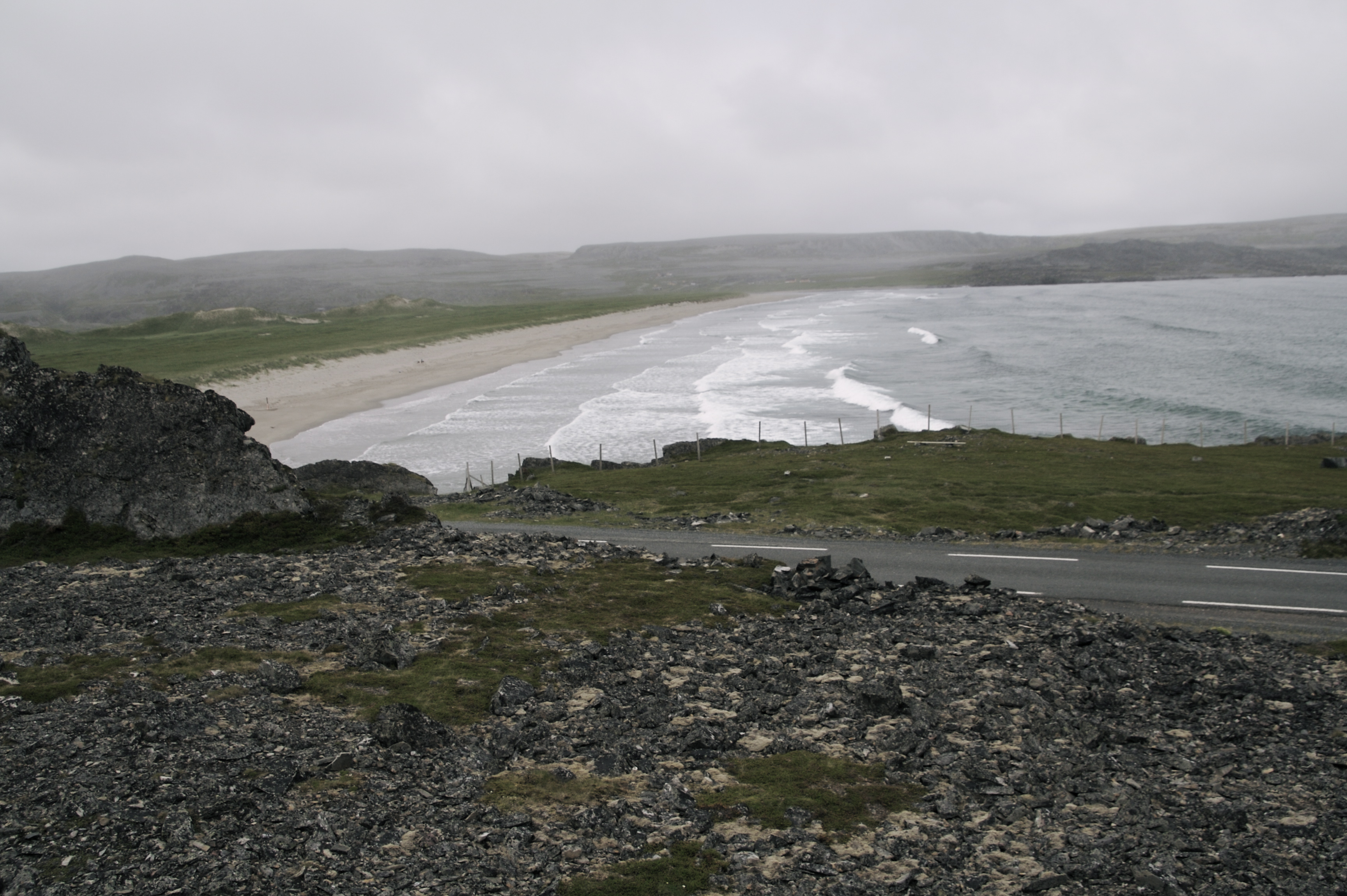 Fylkesveg 341 i Finnmark